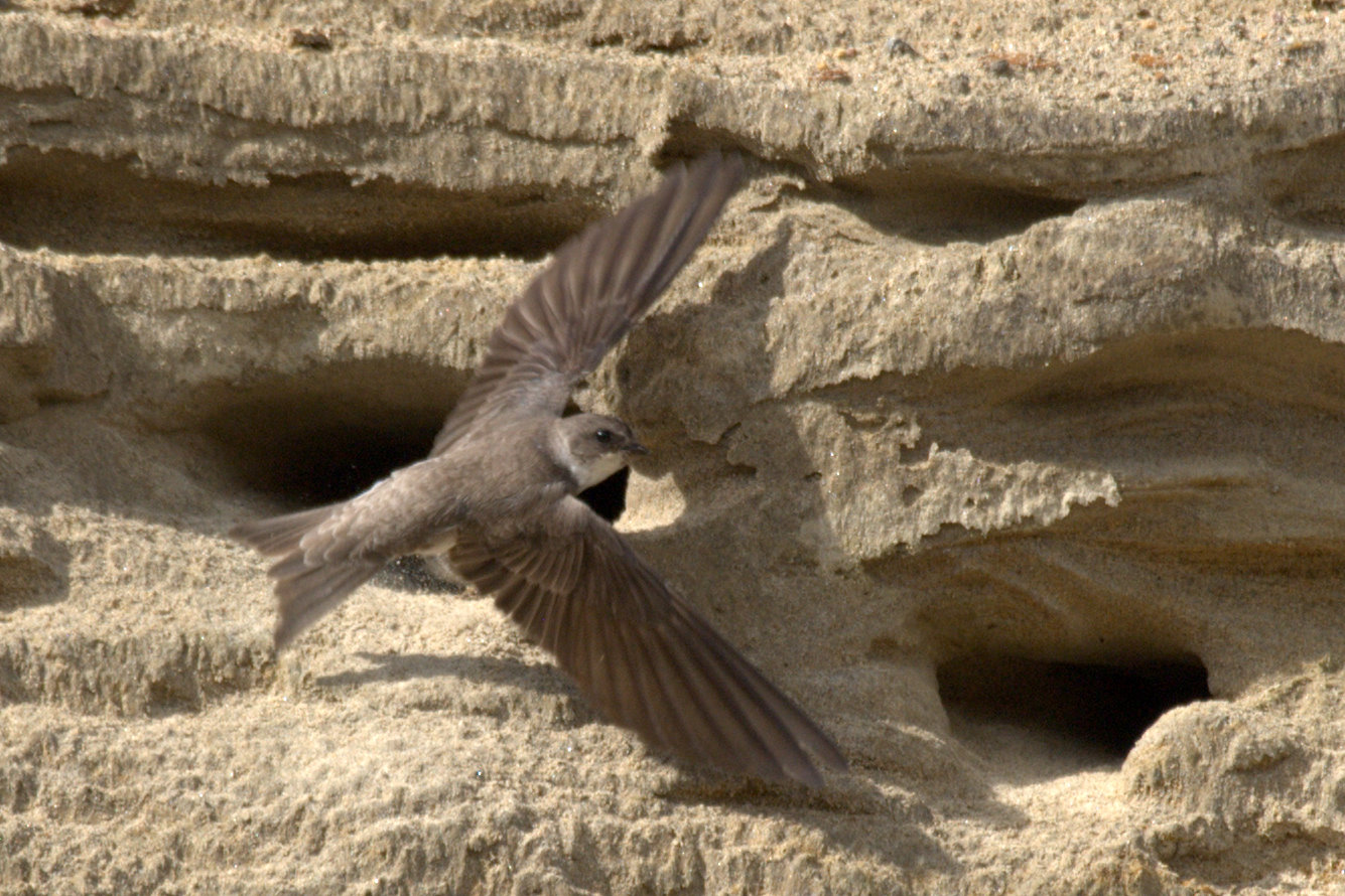 Törmäpääsky Kuhmalahti Vuortenharju